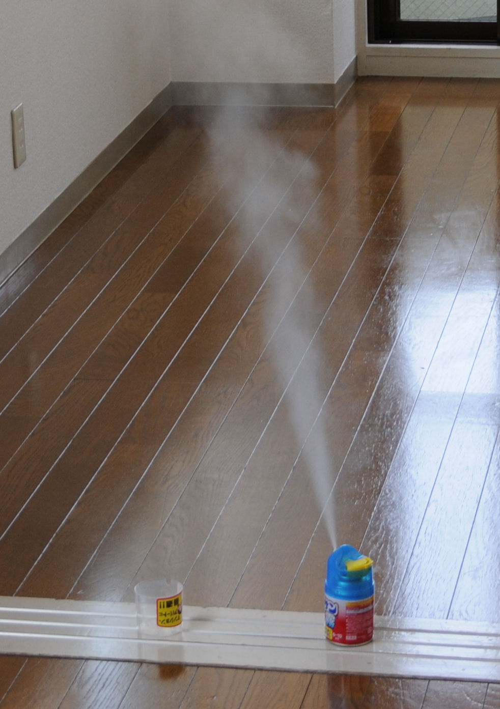 薫煙剤(霧タイプ)